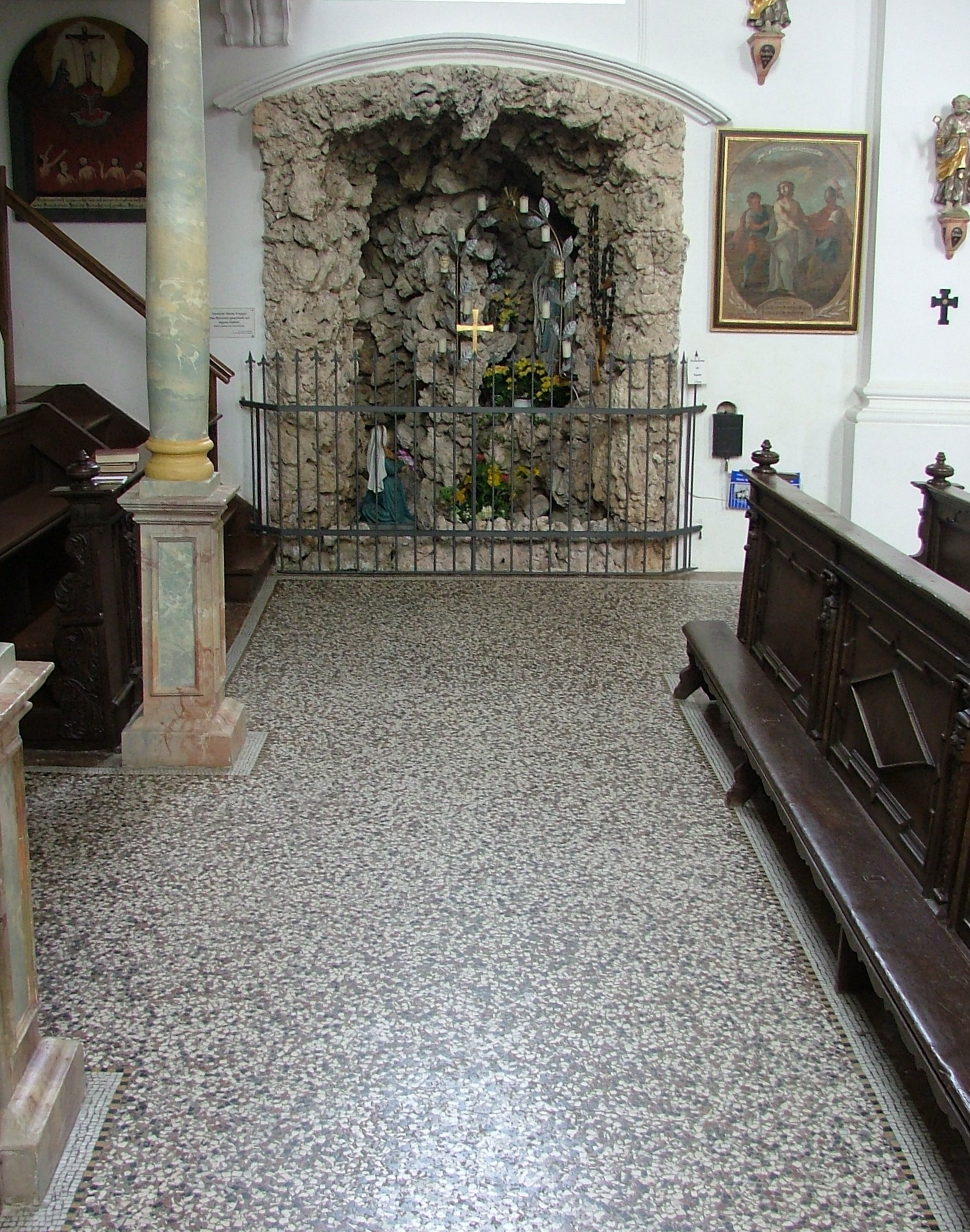 Maria Schnee, Lourdesgrotte und Mosaikboden in terrazzo aus dem Jahre 1886